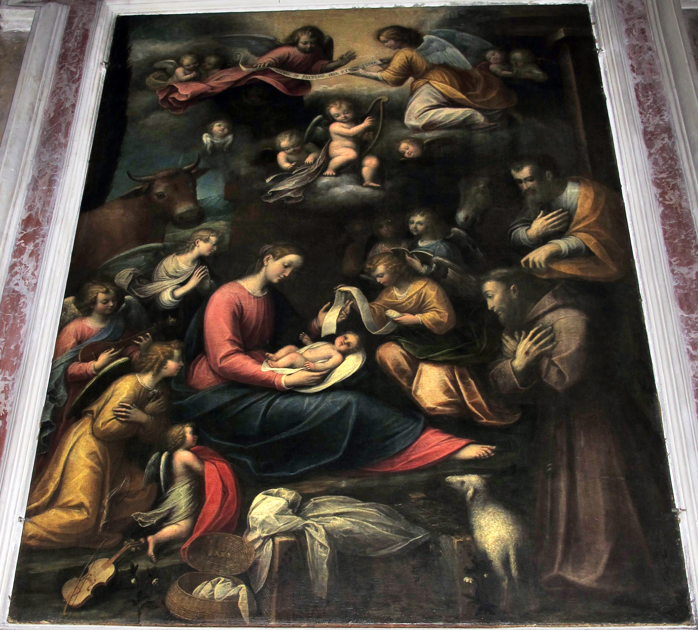 Genova, Liguria